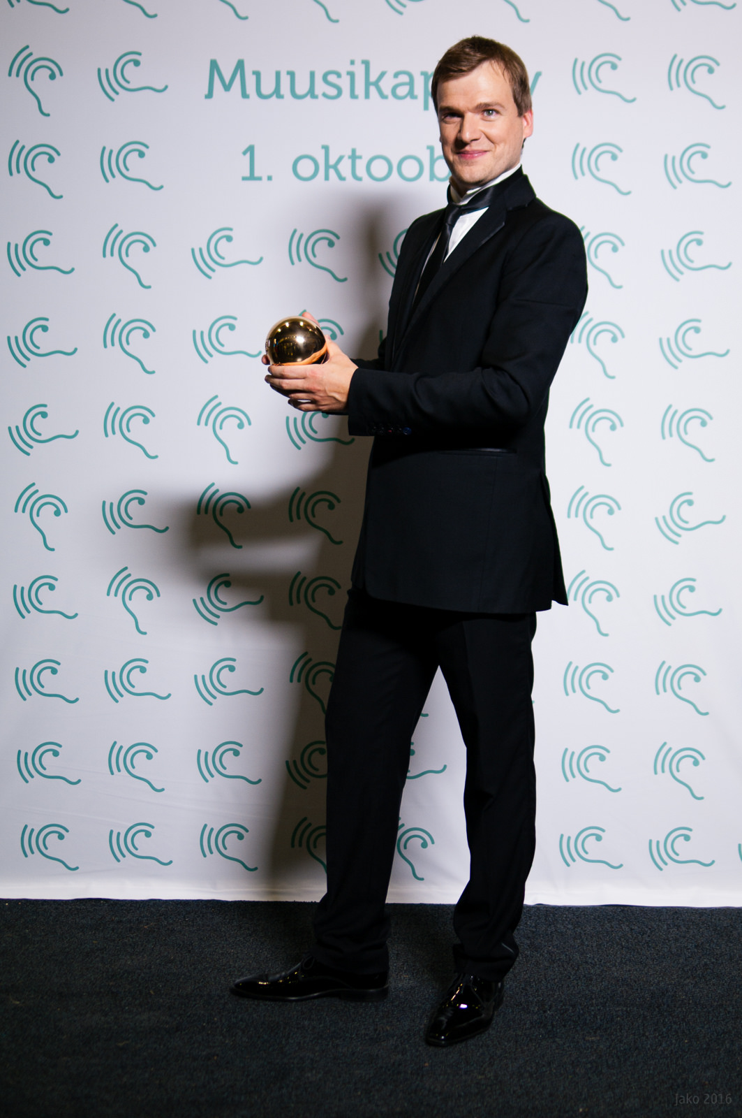 Risto Joost, Eesti Kultuurkapitali helikunsti sihtkapitali aastapreemia laureaat